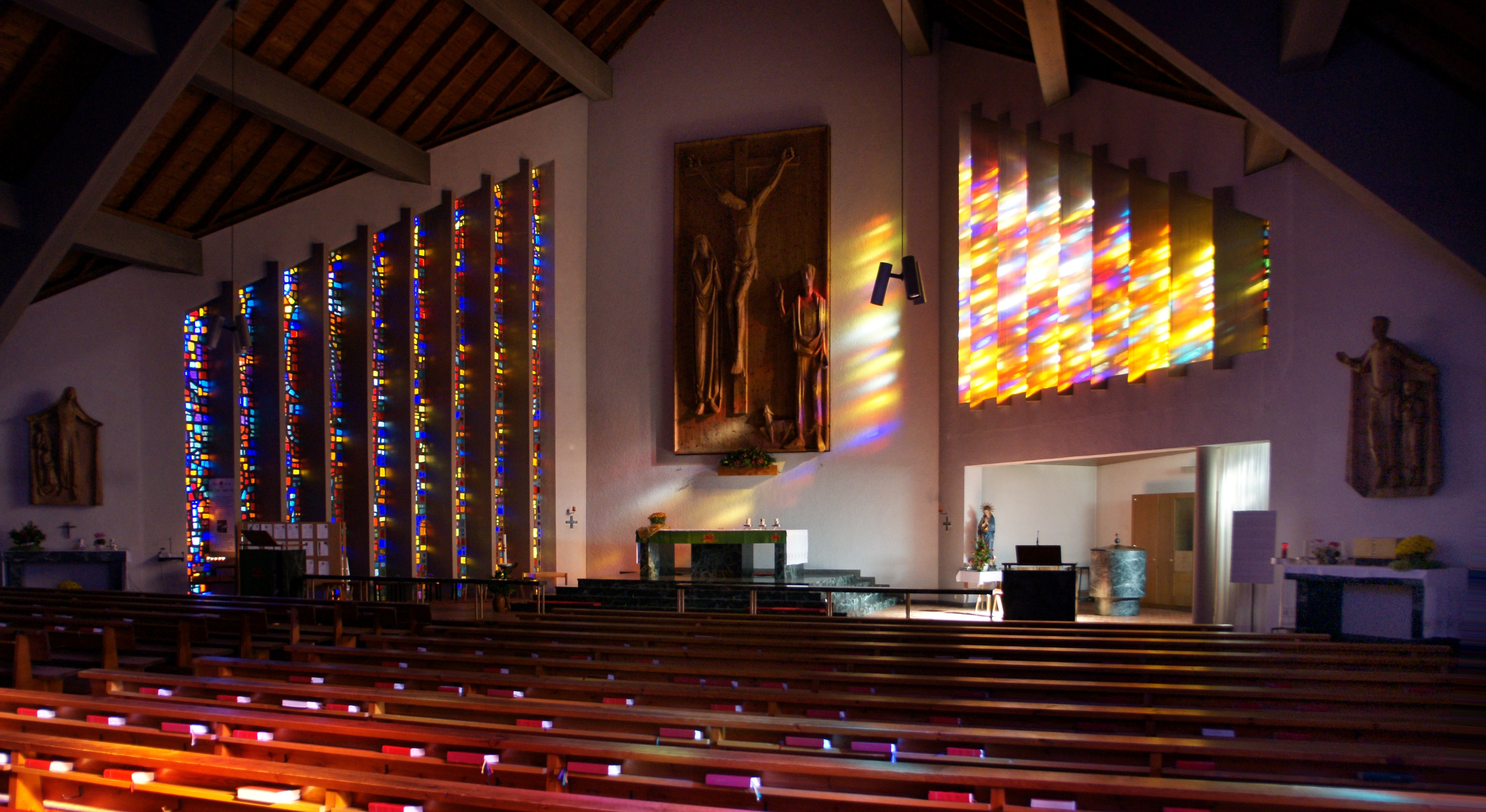 neue Pfarrkirche von Vandans, neben der alten Kirche 1959 nach Plan von Hans Fessler erbaut, 1960 geweiht. Altar Relief von Sepp Baumgartner, Orgel Firma Walcker 1961.